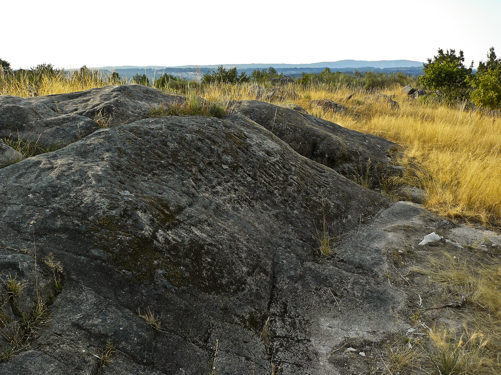 Petróglifos do Chan da Ferradura - Amoeiro - Ourense- Galiza - España